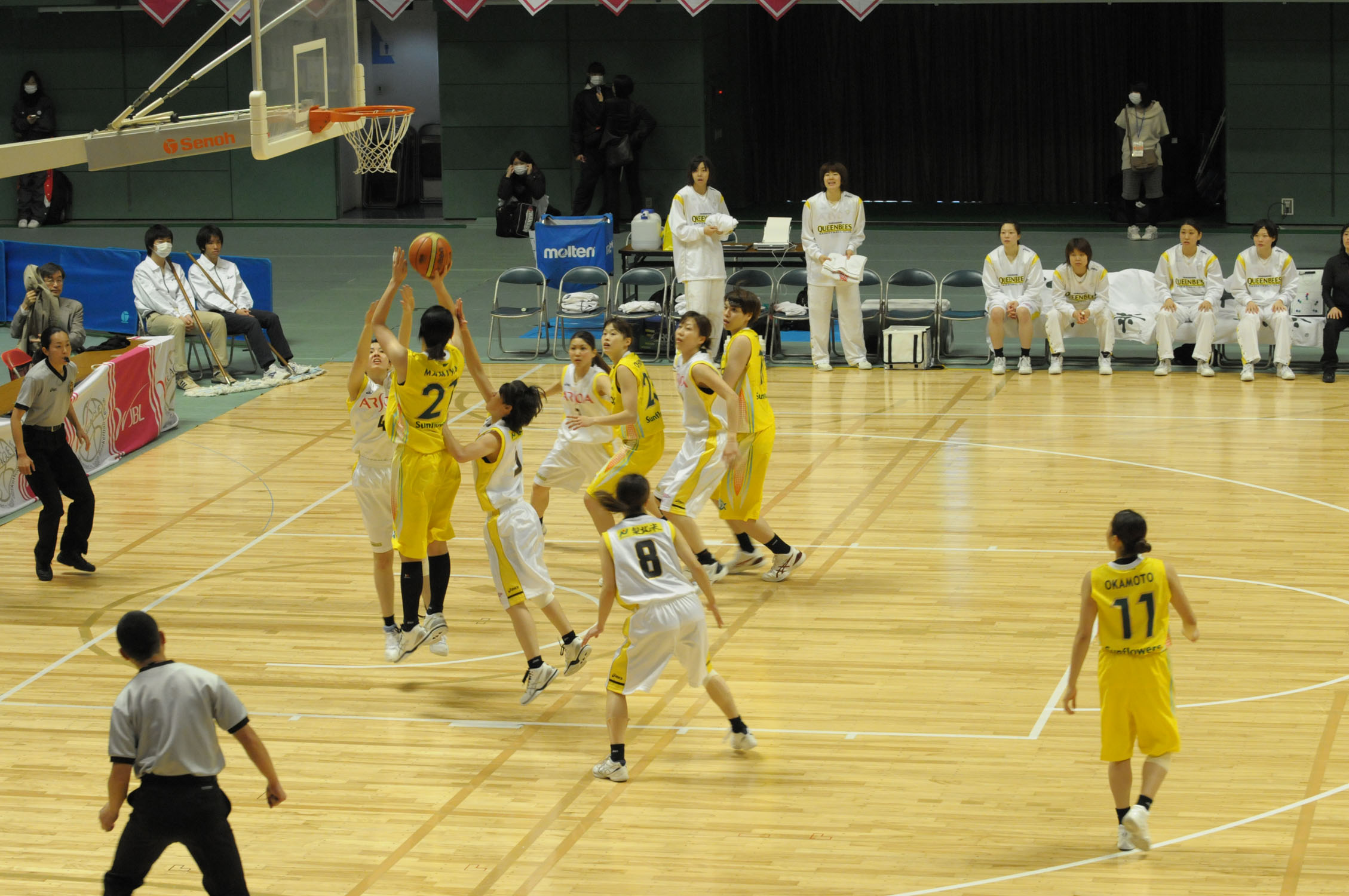 WJBL 13-14レギュラーリーグ、JX-ENEOS対山梨クイーンビーズ。横須賀アリーナ。